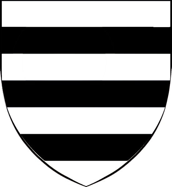 Vapensköld för adelsätten Kåse nummer 139